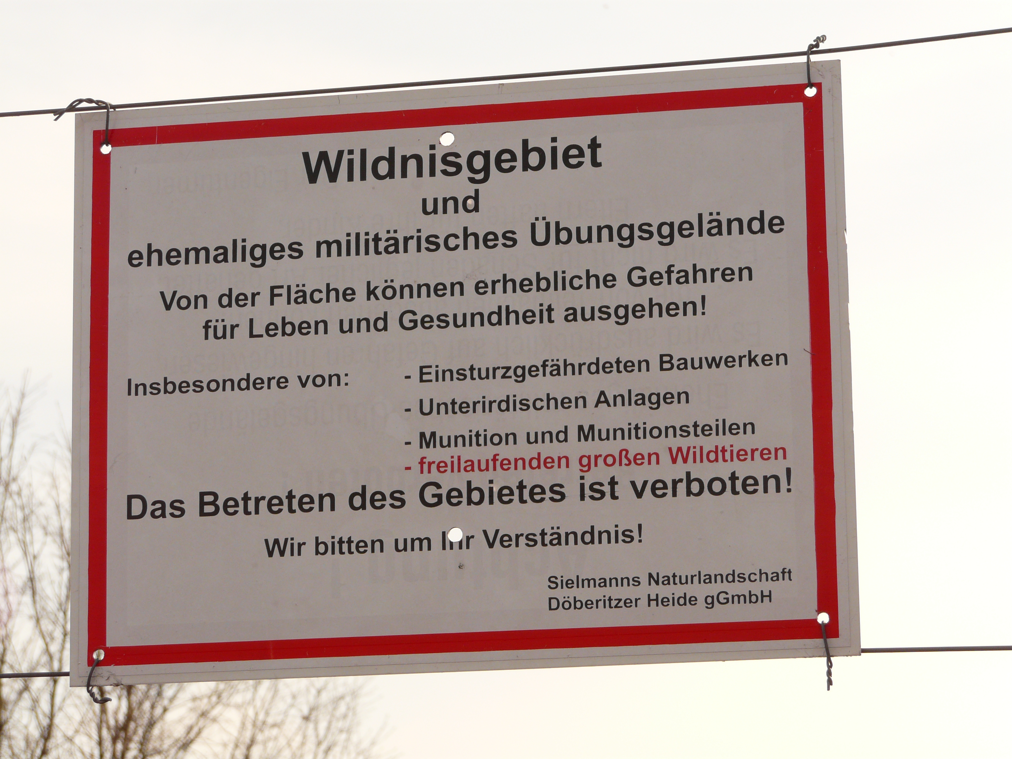 Schild am Wildnisgebiet Döberitzer Heide, Berlin/Brandenburg